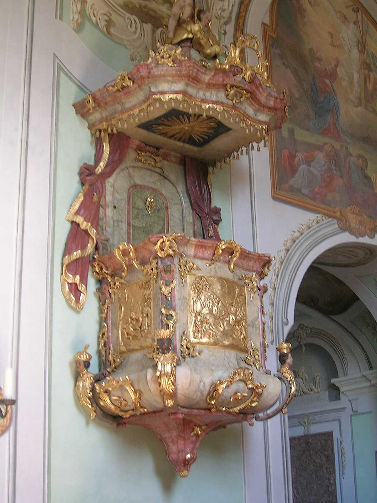 Pfarrkirche Hörgertshausen: KanzelThis is a photograph of an architectural monument.